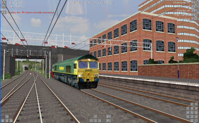 Ruta NWM para OpenBVE